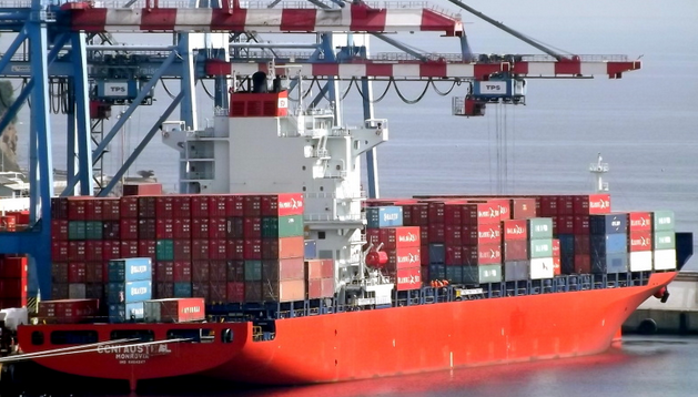 4.400 teus